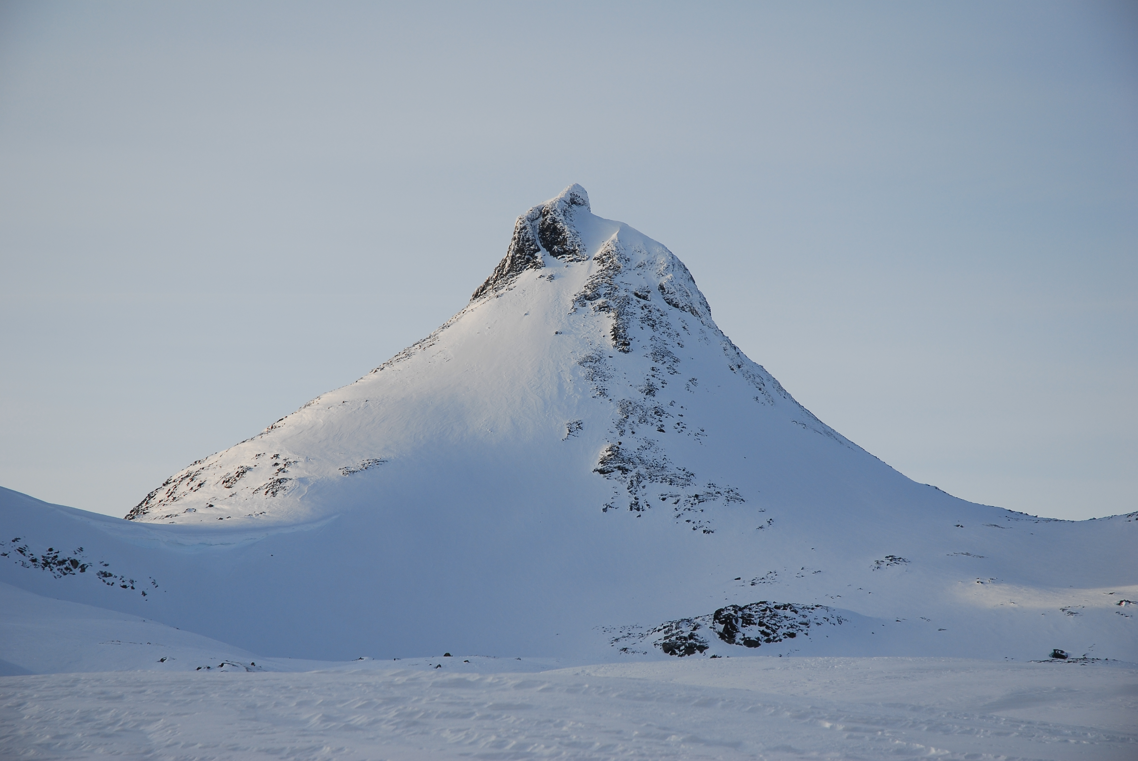 Foto: Jon Olav Volden